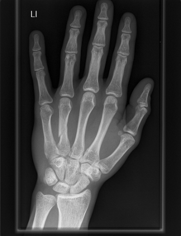 Hand X-ray